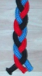 Braiding